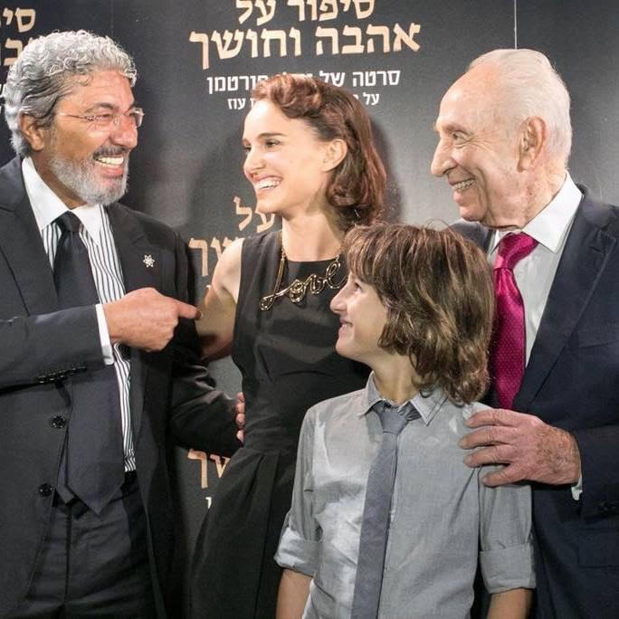 חזי בצלאל שמעון פרס והשחקנית נטלי פורטמן